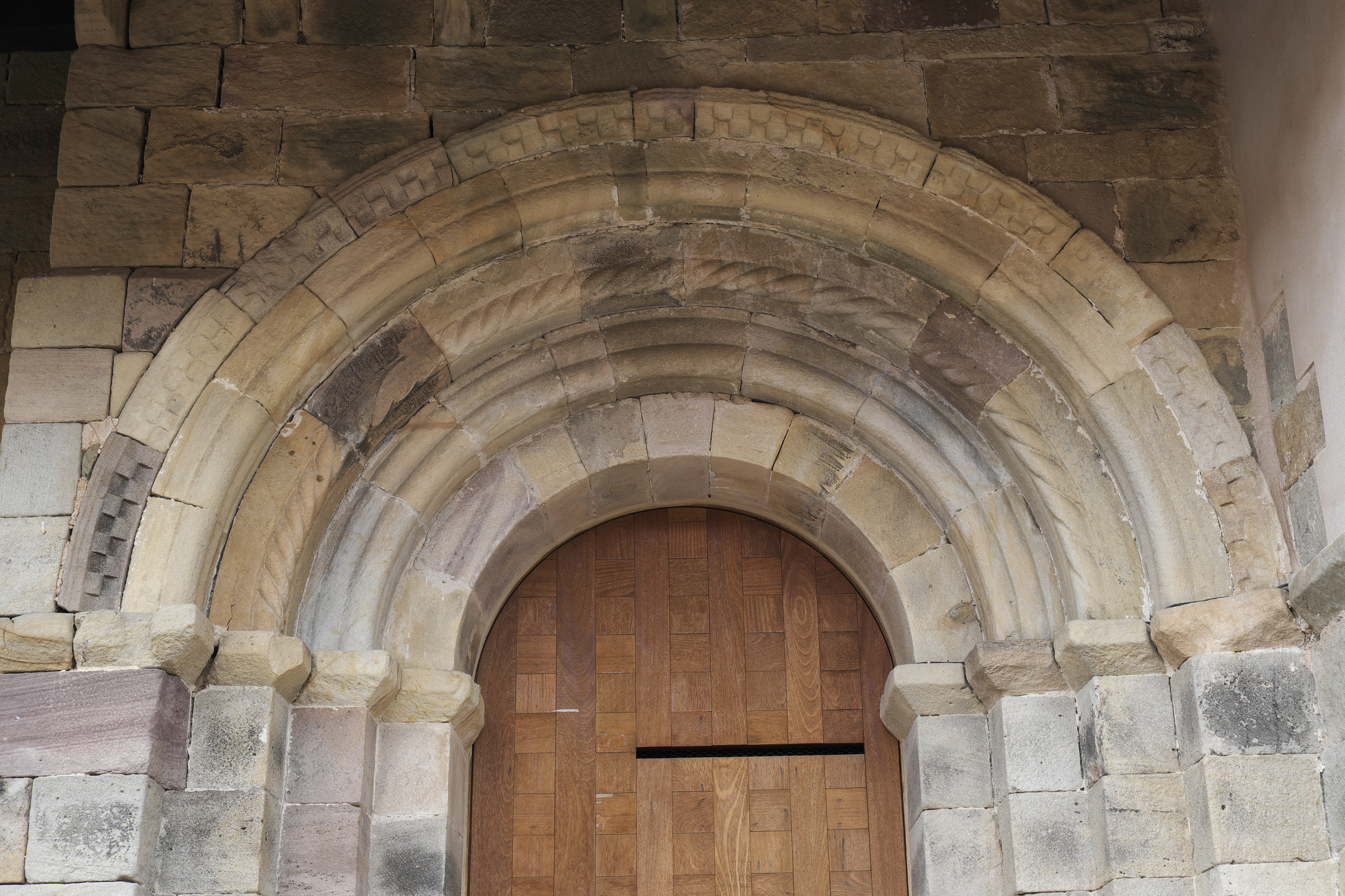 Katholische Kirche San Martín in San Martín de Hoyos, einem Ortsteil von Valdeolea (Kantabrien/Spanien), romanisches Archivoltenportal